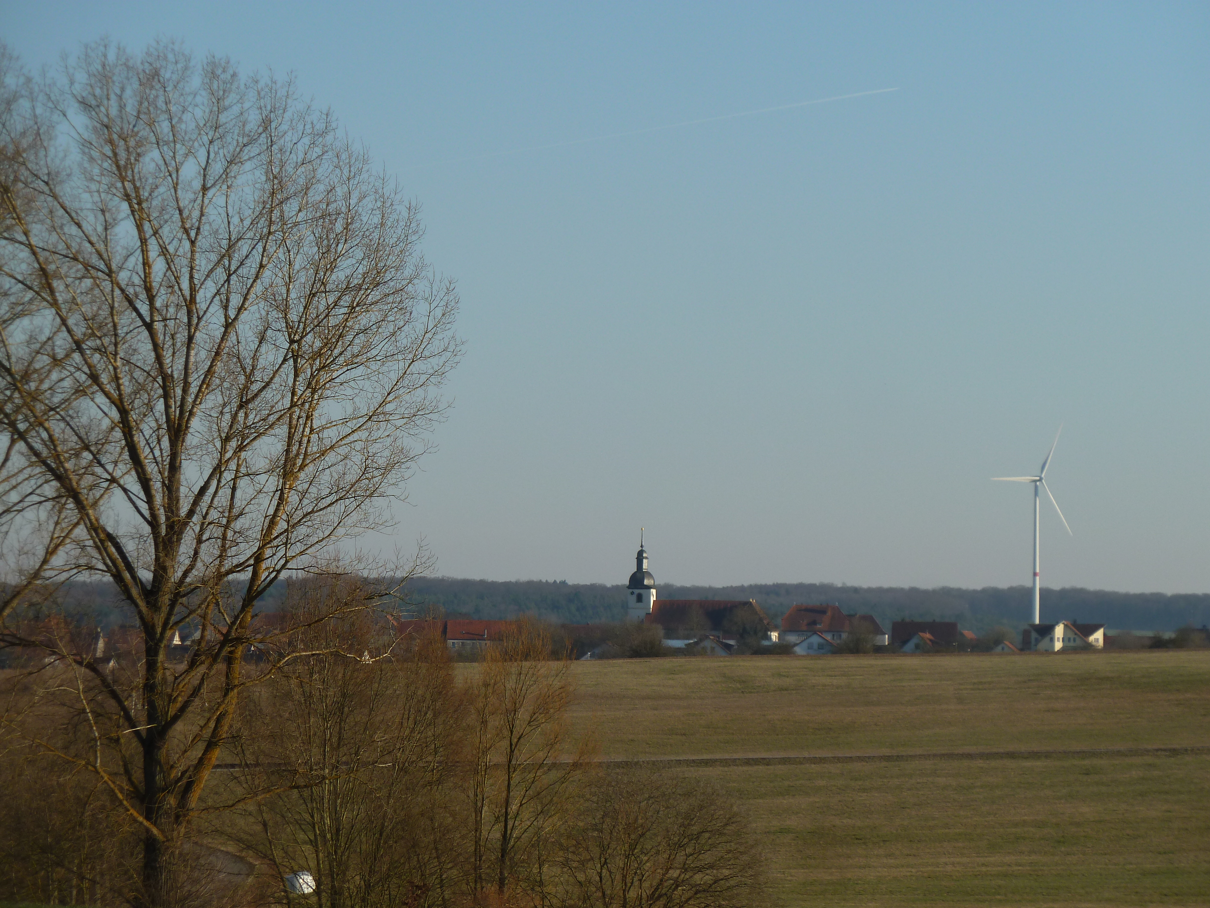 Blick auf die Pfarrkirche St. Bonifatius